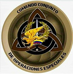 Escudo del Comando Conjunto de Operaciones Especiales 256px